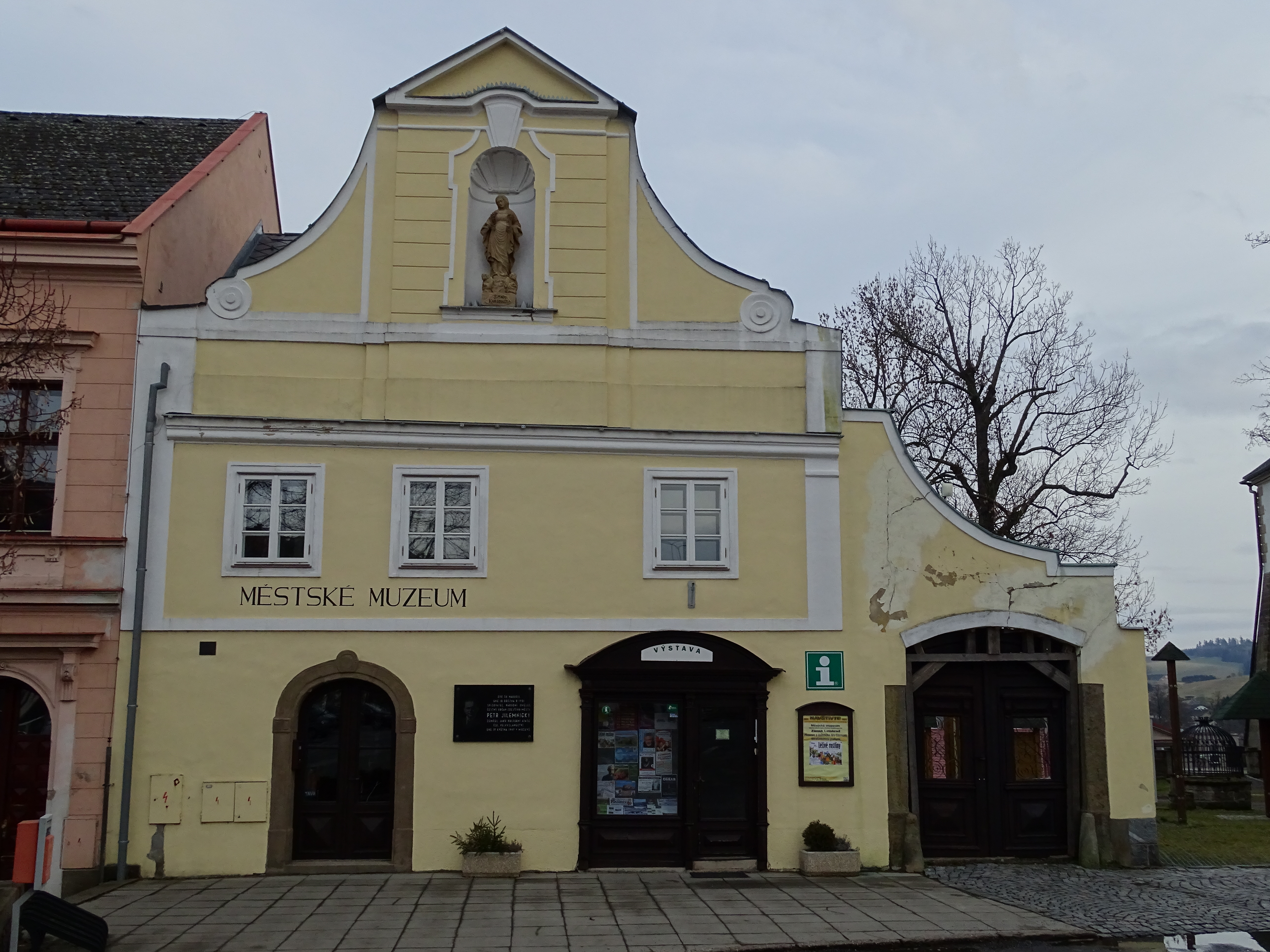 rodný dům